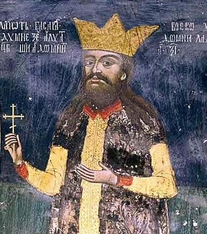 Basarab Laiotă, painting at Hurezi Monasterz